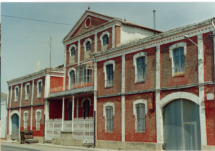 Casa notable en Villarramiel (Palencia)